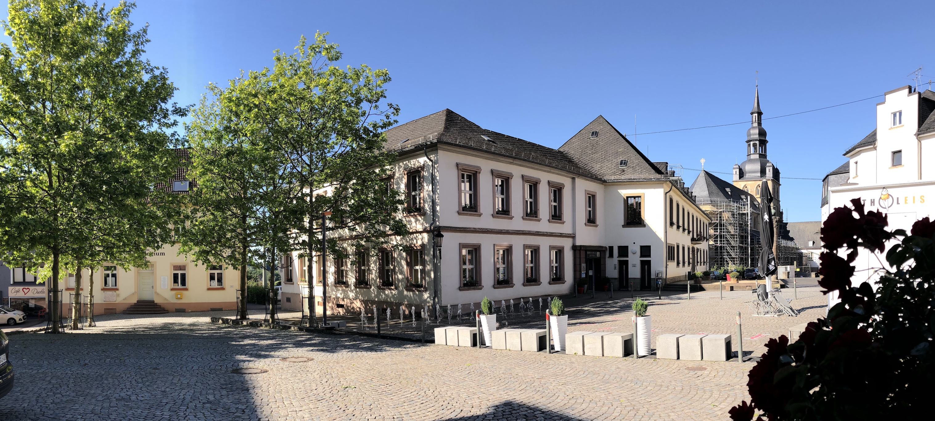 Bild vom Tholeyer Marktplatz im Mai 2020